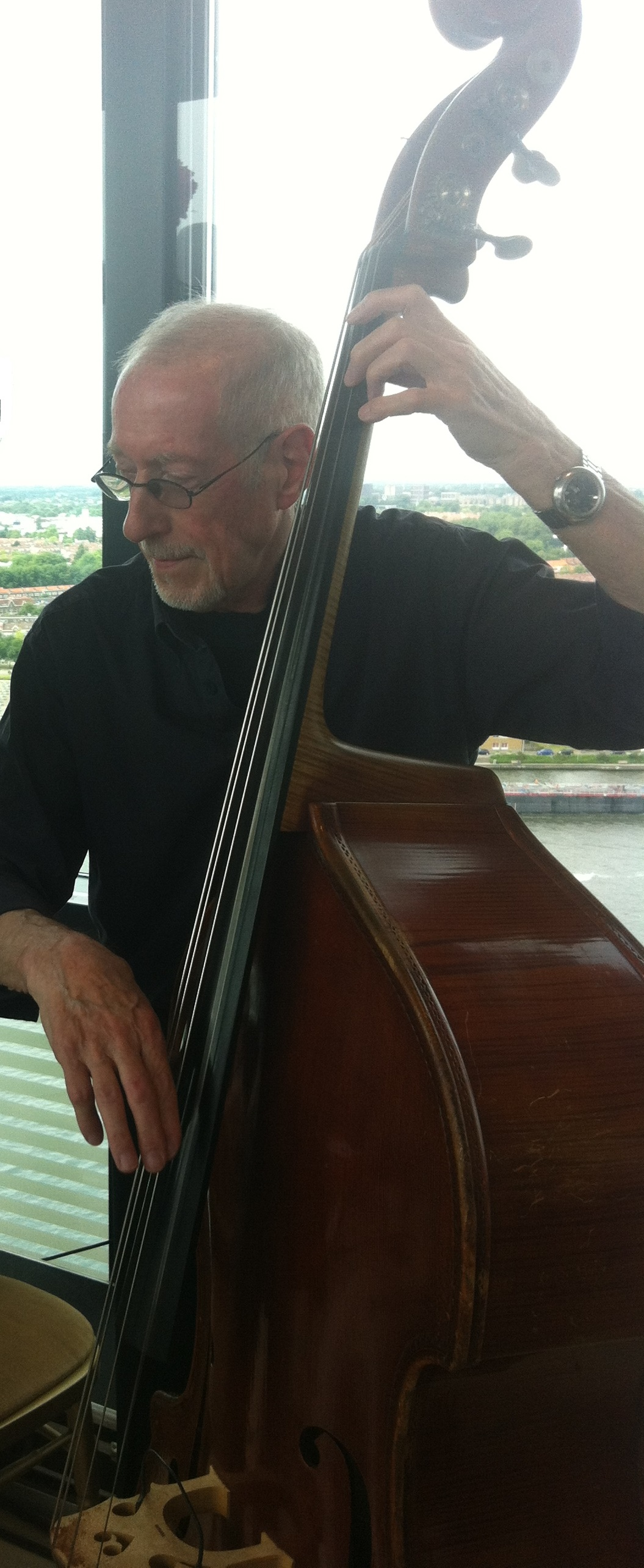 Nederlands jazzbassist